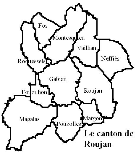 Le canton de Roujan Image personnelle